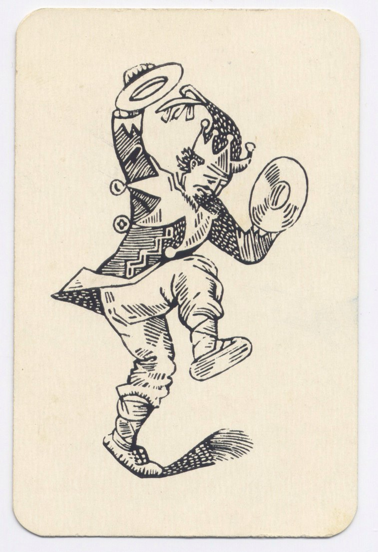 Джокер из атласной колоды.